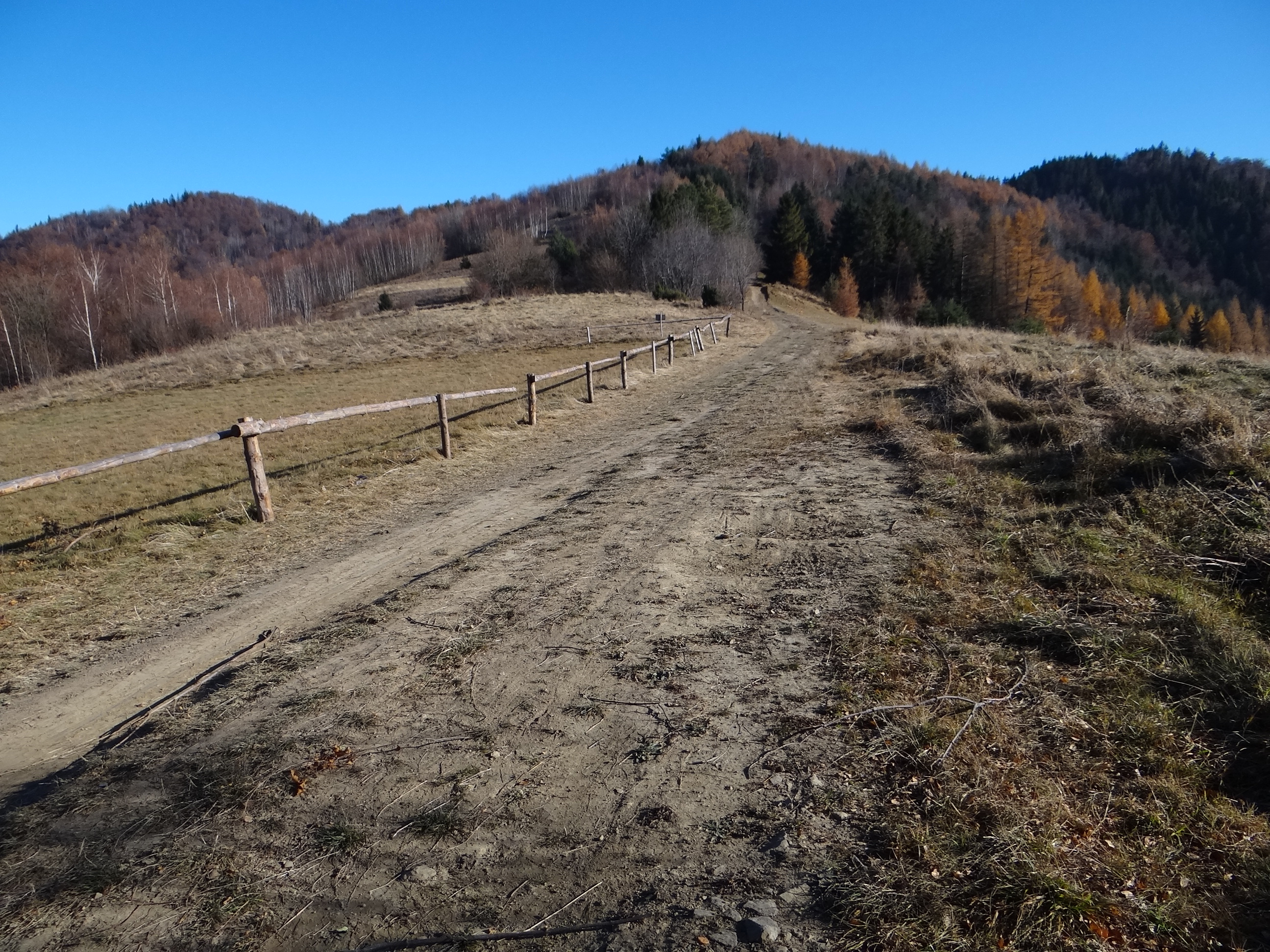 Polana Kolebisko i szczyt Jaworzynki